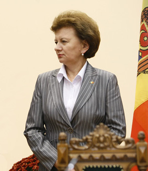 Премьер-министр Республики Молдова З.П.Гречаный, 2008